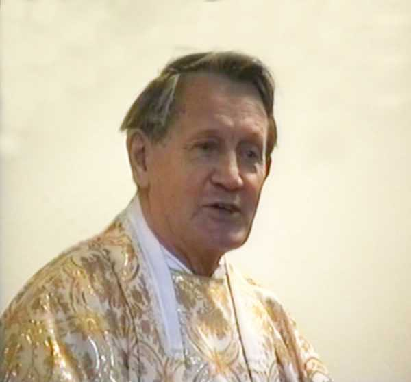 pater Václav Dvořák